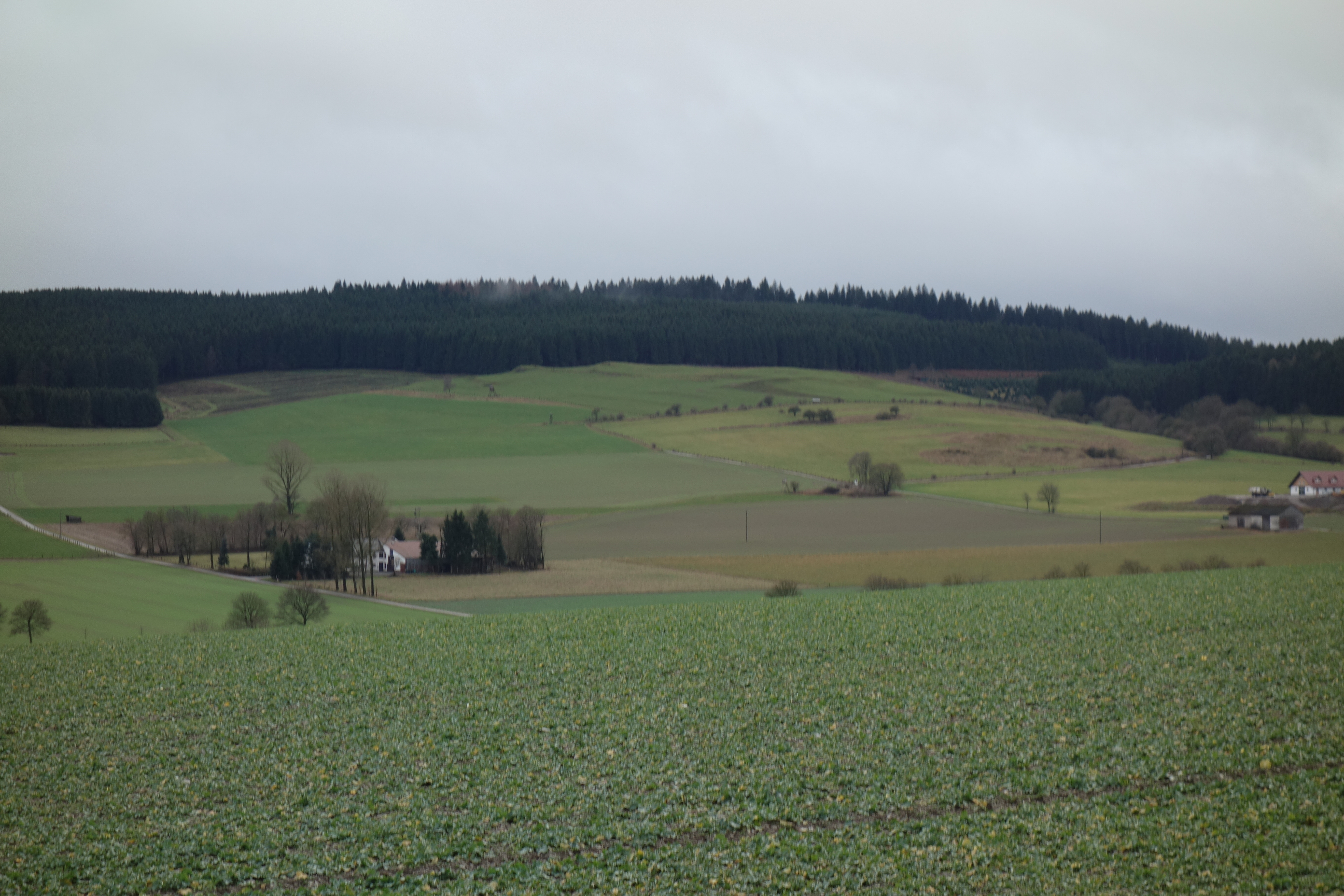 Im Bildmittelteil das Landschaftsschutzgebiet Grünlandgürtel am Südfeld. Rechts am Rand das Landschaftsschutzgebiet Grünlandgürtel am Südfeld. Rapsfeld im Vordergrund gehört zum Landschaftsschutzgebiet Wintertal/Escherfeld und Wald im Hintergrund zum Landschaftsschutzgebiet Brilner Kalkplateau und Randhöhen.